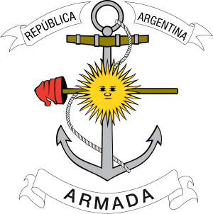 Escudo de la Armada de la República Argentina